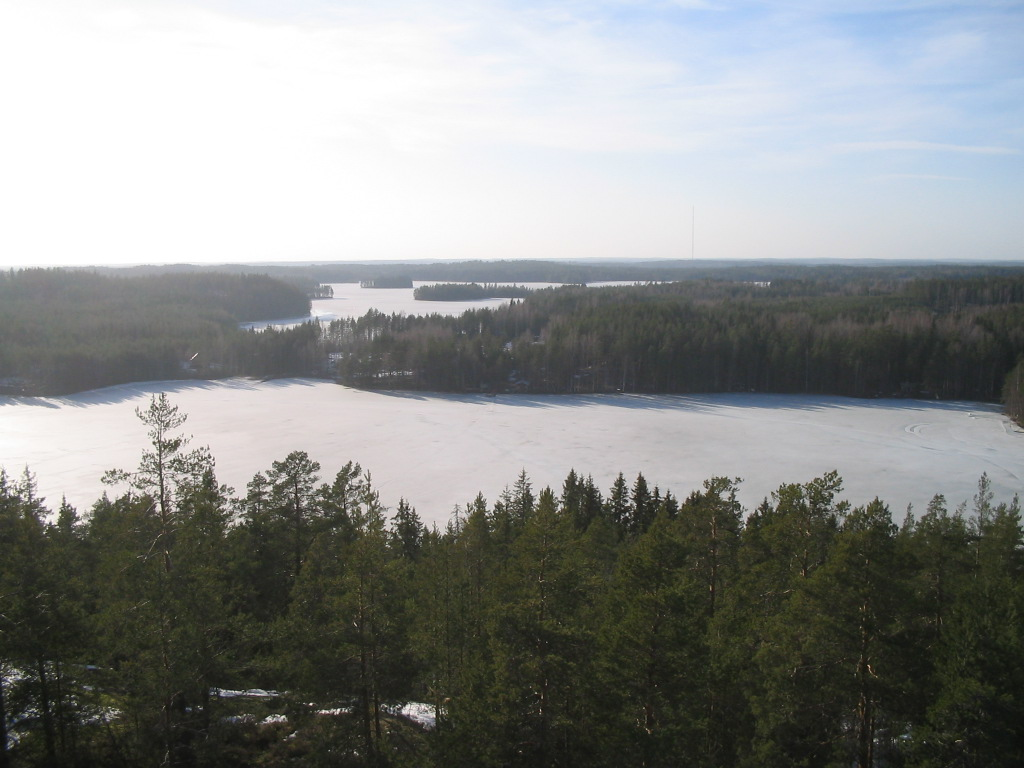 Näkymä Haminan Siliävuorelta